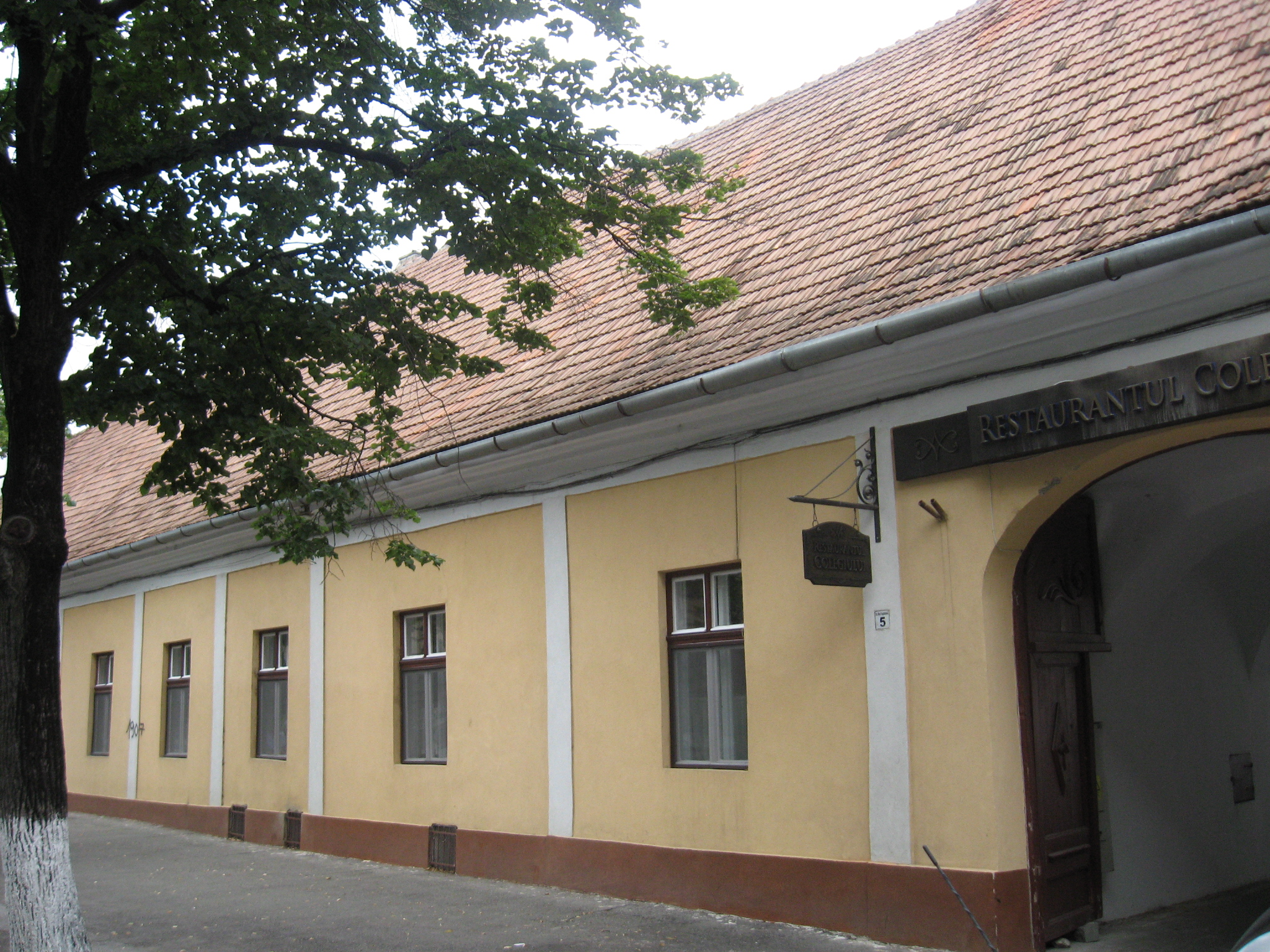 Cluj-Napoca, Casa Pataki-Tollas (str.M.Kogălniceanu nr.5)